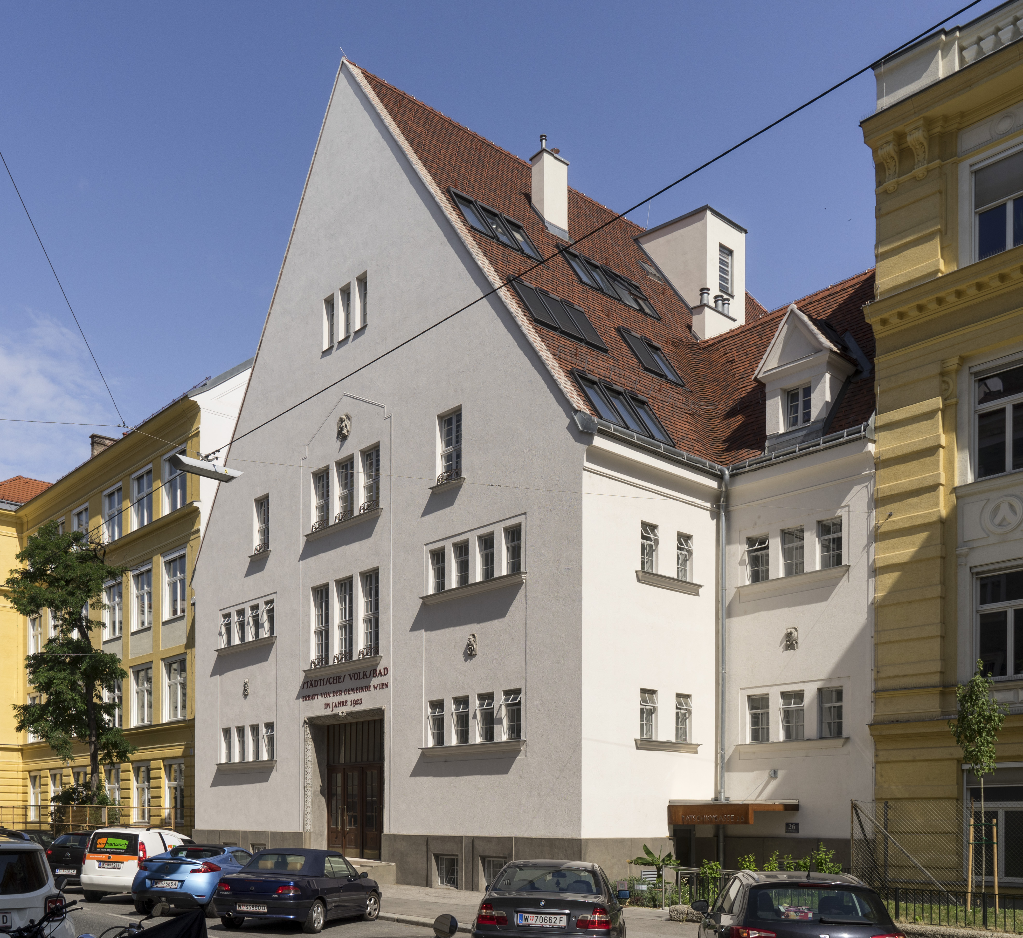 Ratschkybad, Wien